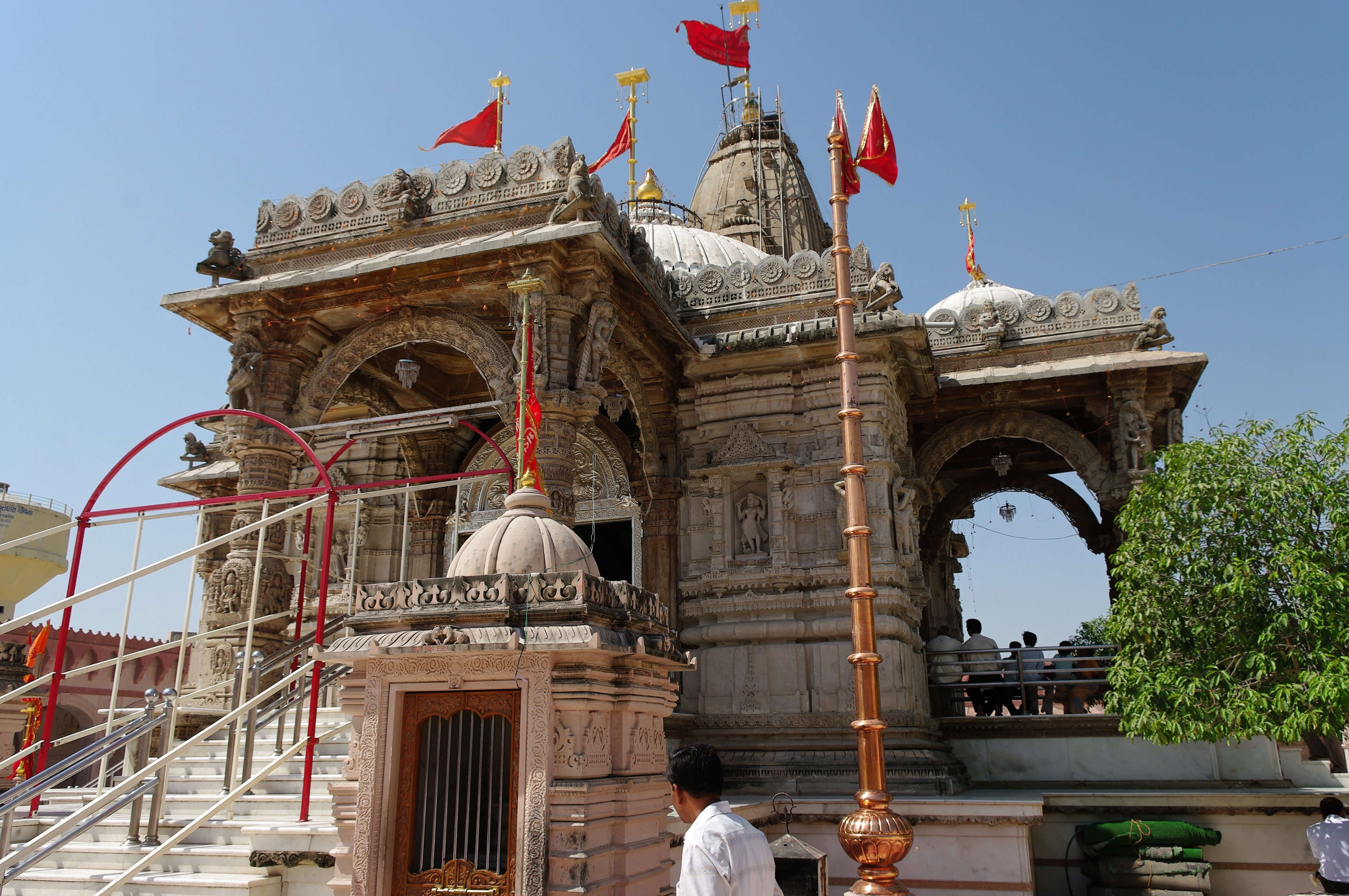 Umiya Mata Temple at Unjha,Gujarat, India